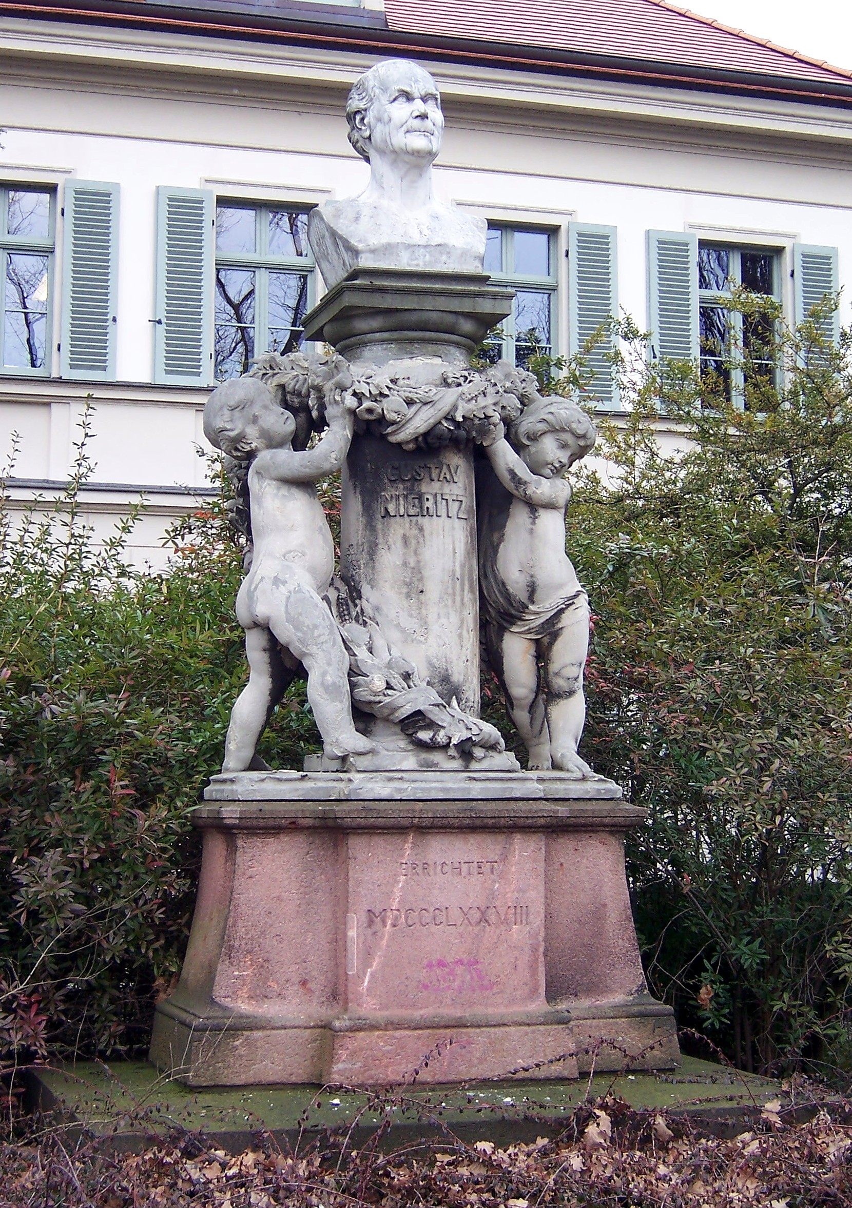 Nieritzdenkmal (1876—1878) in Dresden von Gustav Kietz